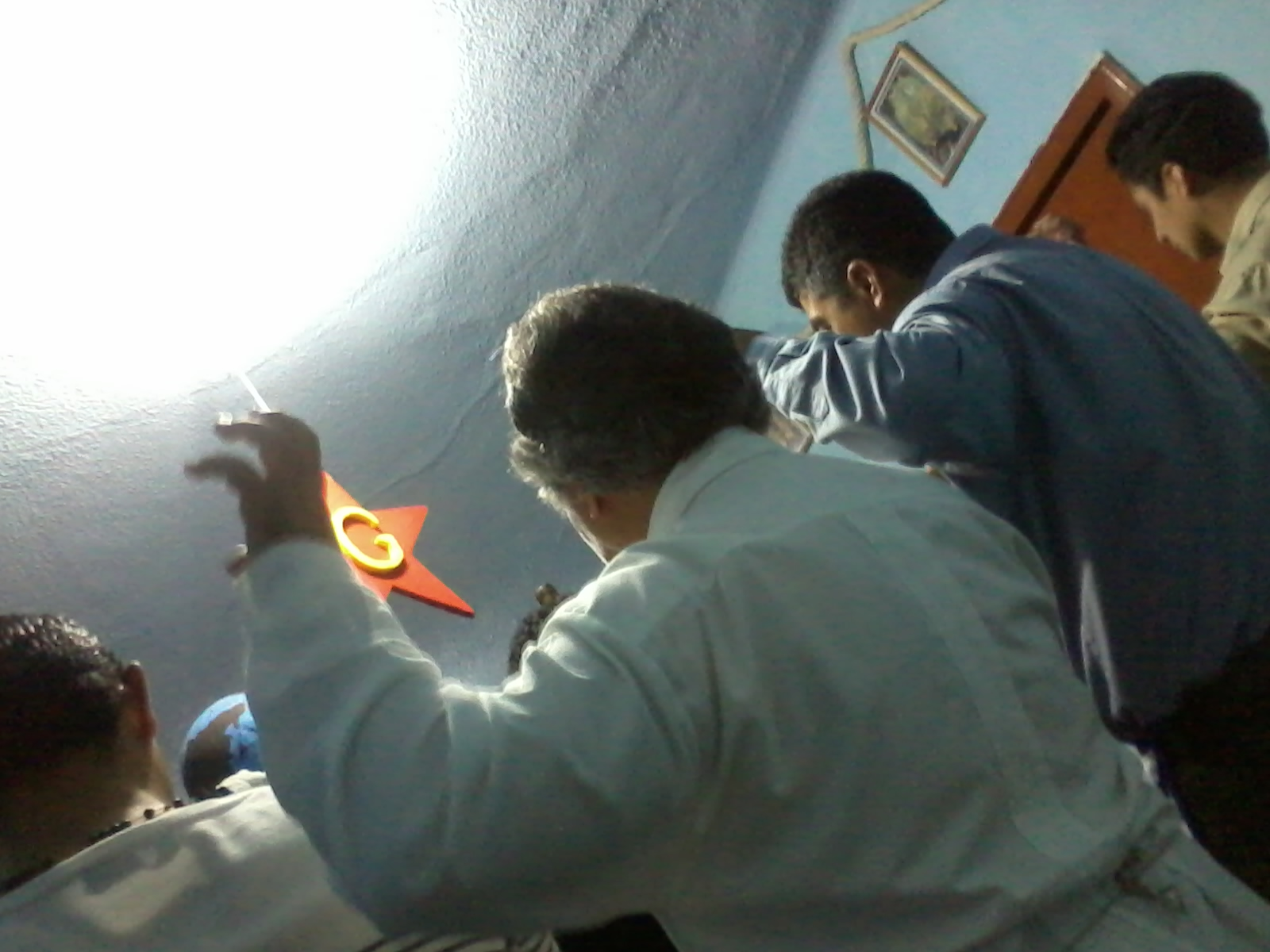 Ceremonia de aumento de salario (paso del grado de aprendiz al grado de compañero) en una logia del Rito Nacional Mexicano (masonería, México, D.F.)